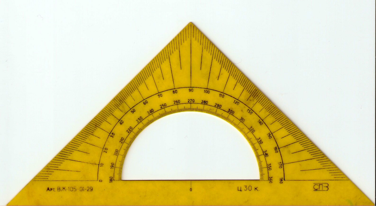 Угольник с транспортиром